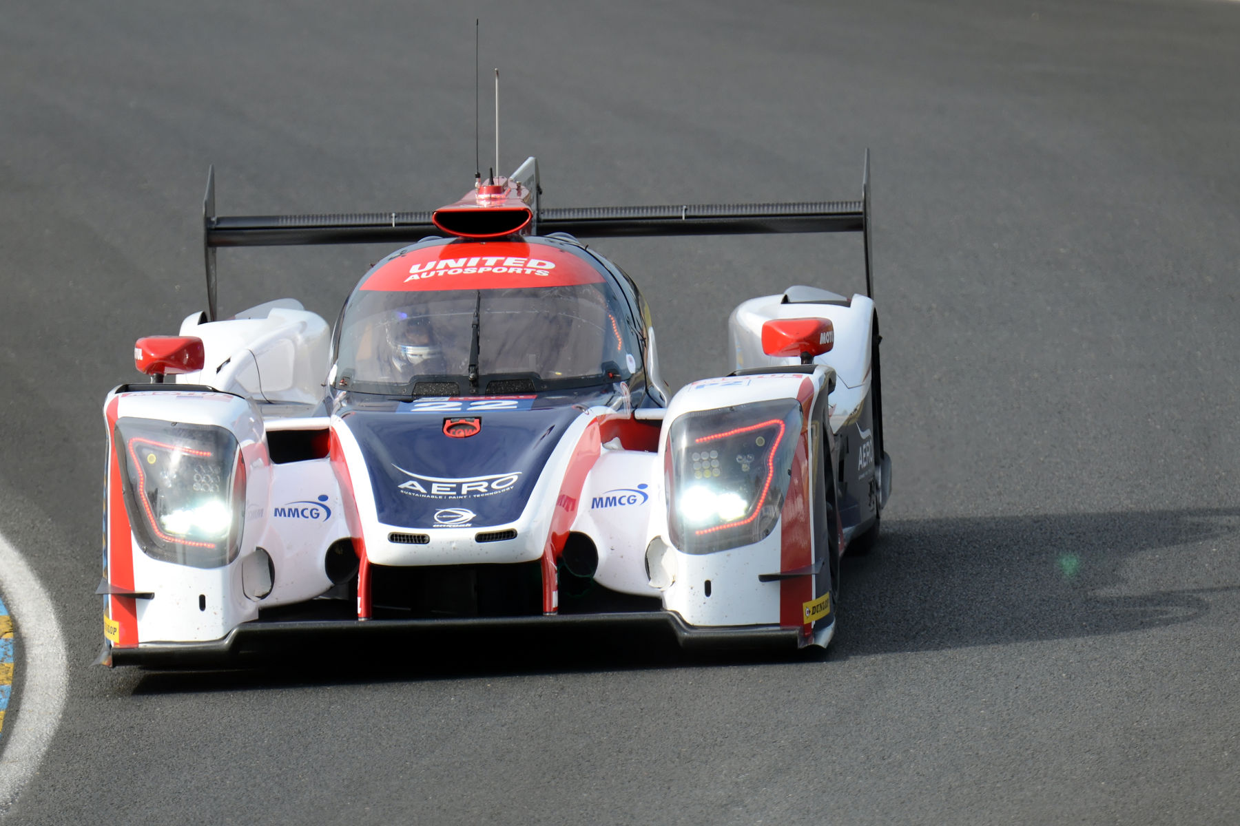 La Ligier JS P217 - Gibson n°22 de l'écurie United Autosports pilotée par Phil Hanson, Filipe Albuquerque et Paul di Resta lors de la journée test des 24 Heures du Mans 2018